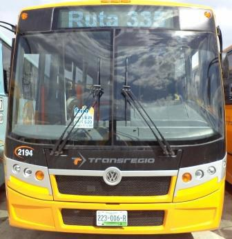 Ruta 335 de Transregio